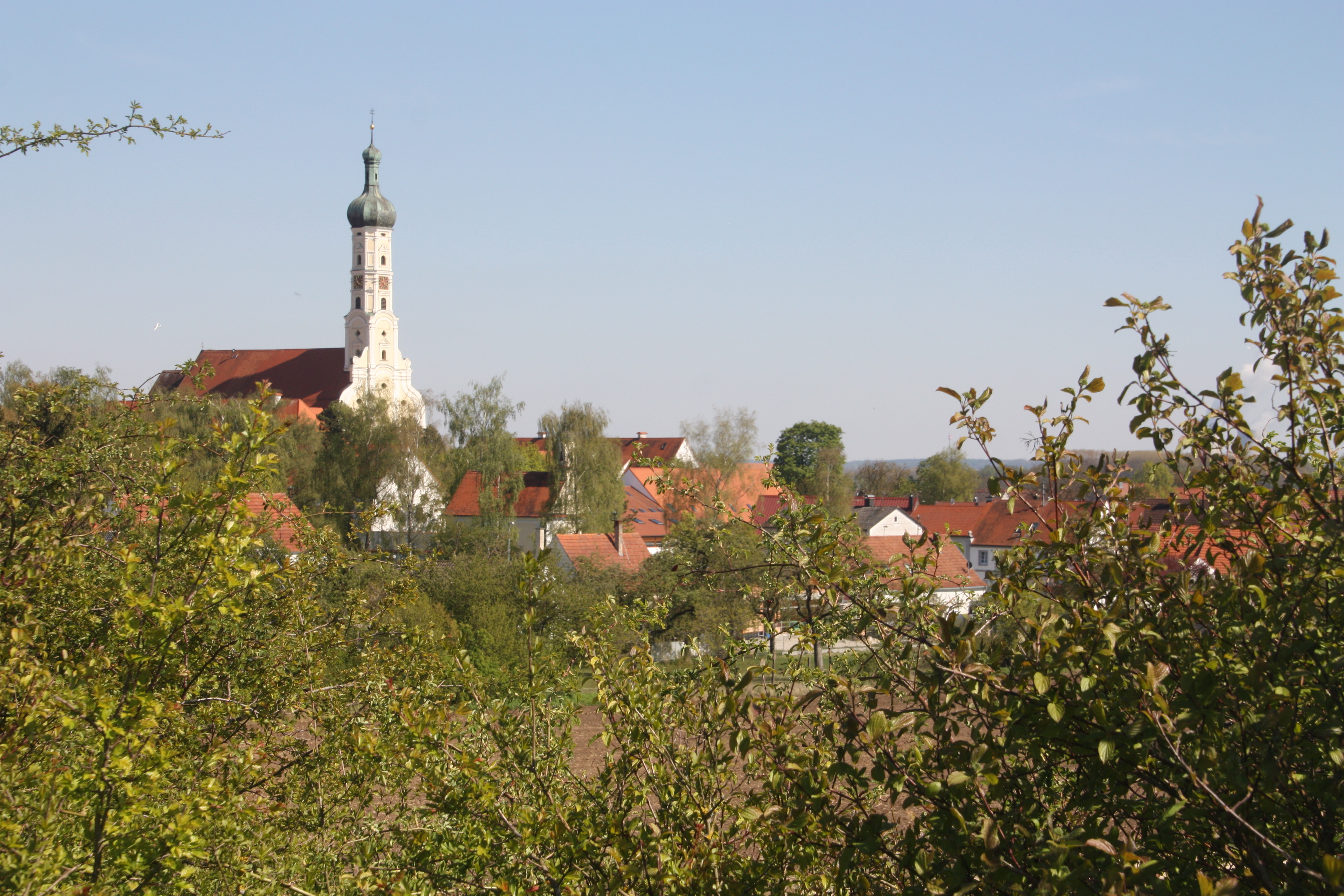 Ortsteil Obermedlingen